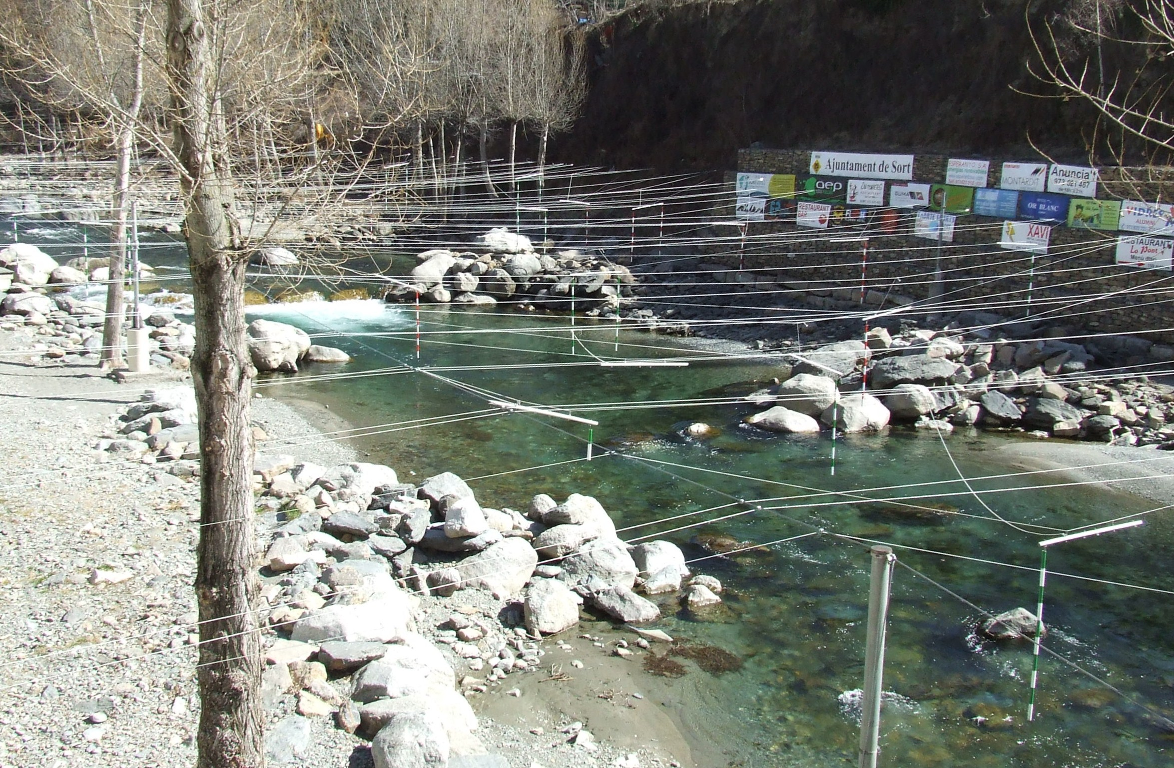 Zona de rafting o piragüisme a Sort (Pallars Sobirà)